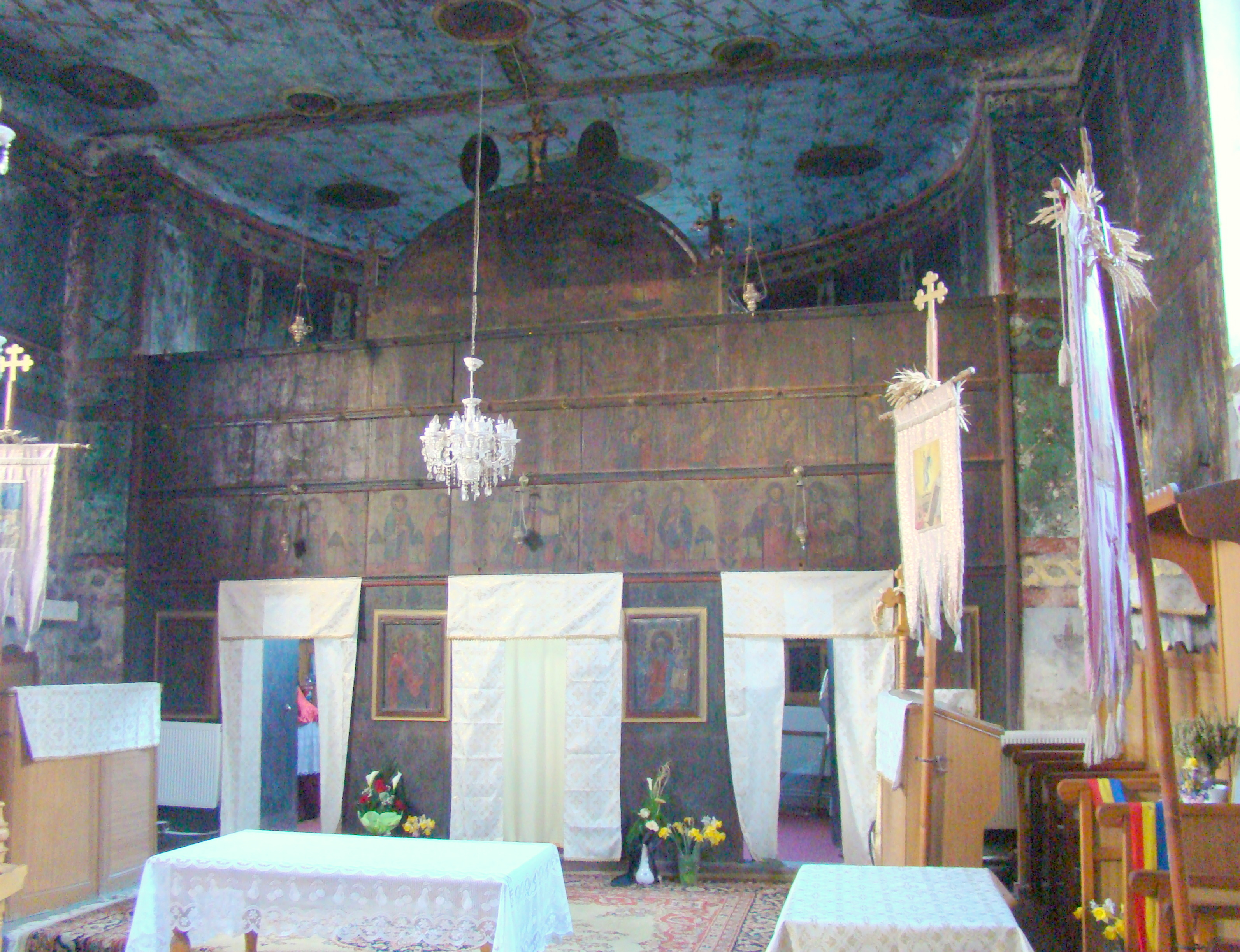 Biserica „Nașterea Maicii Domnului” din Homorog, județul Bihor